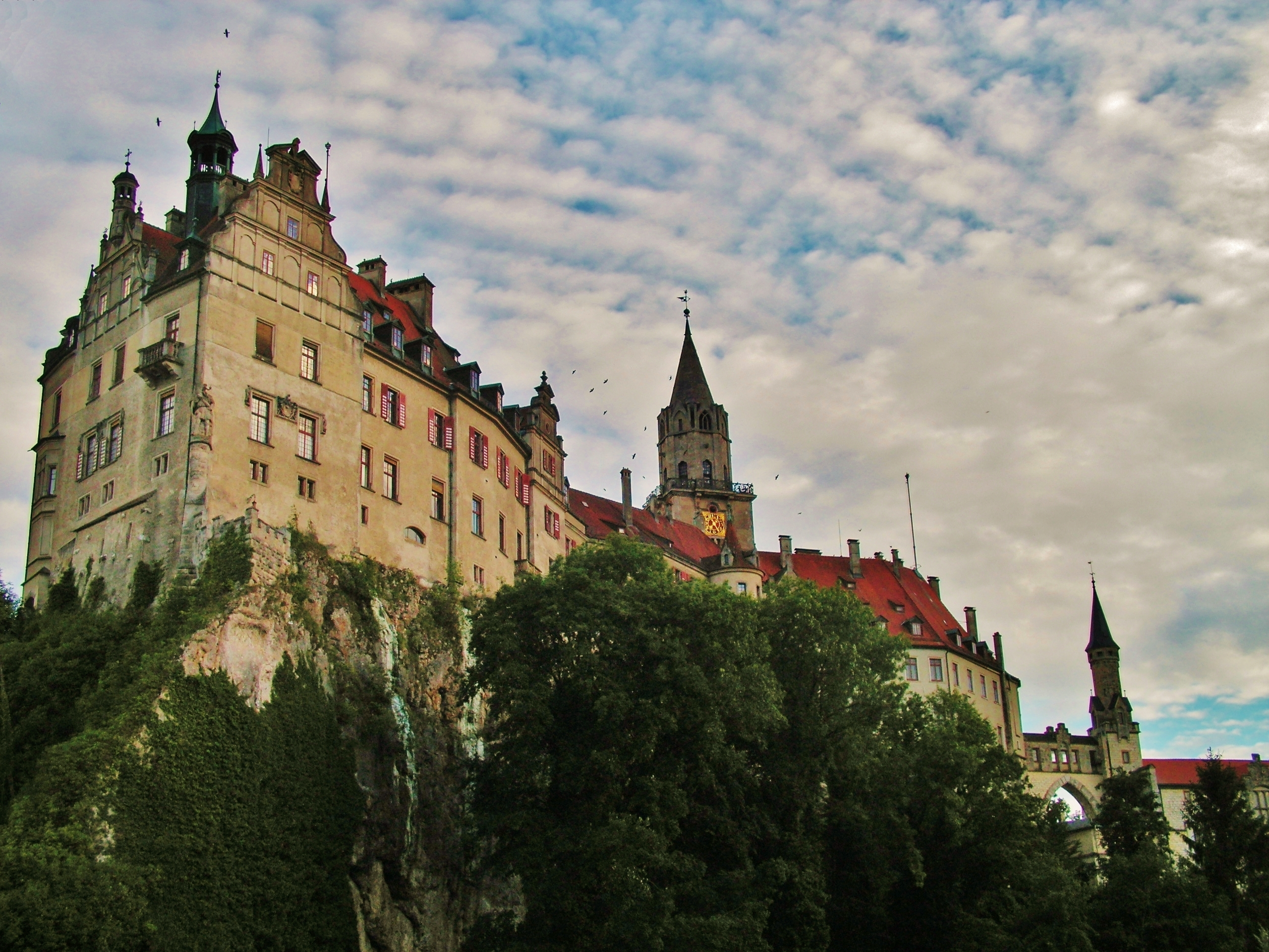 Schloß Sigmaringen